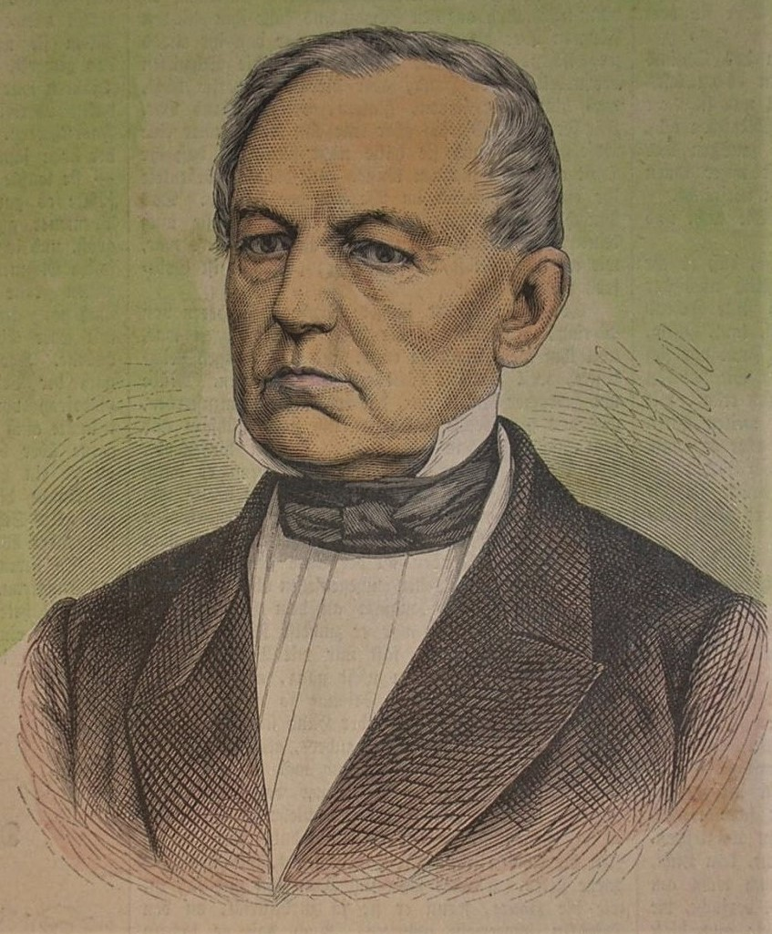 Karl Freiherr von Kraus, österreichischer Reichsgerichtspräsident, teilkolorierter Holzstich, ca. 15 x 12 cm